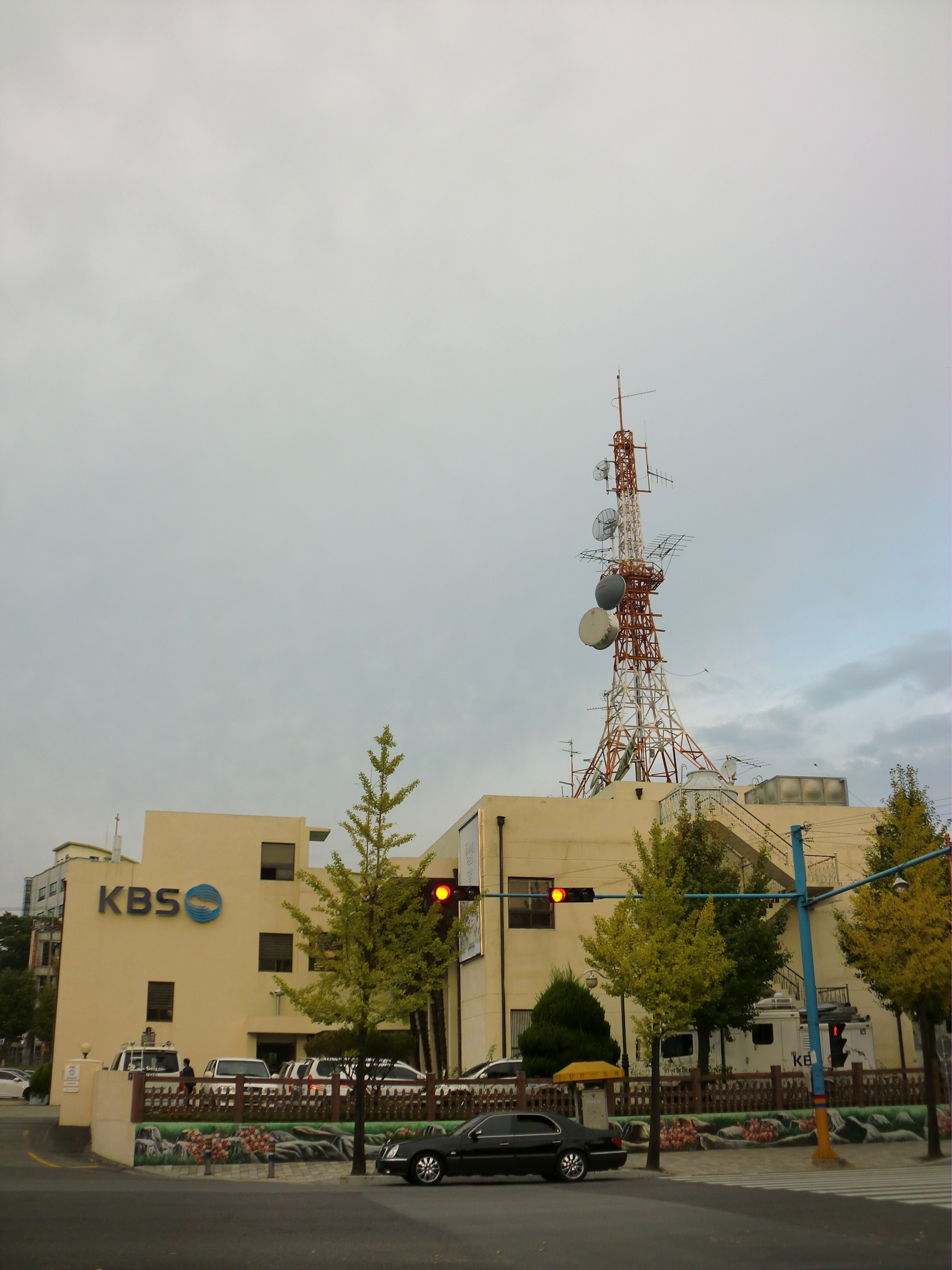 경상남도 진주시에 있는 KBS 진주방송국